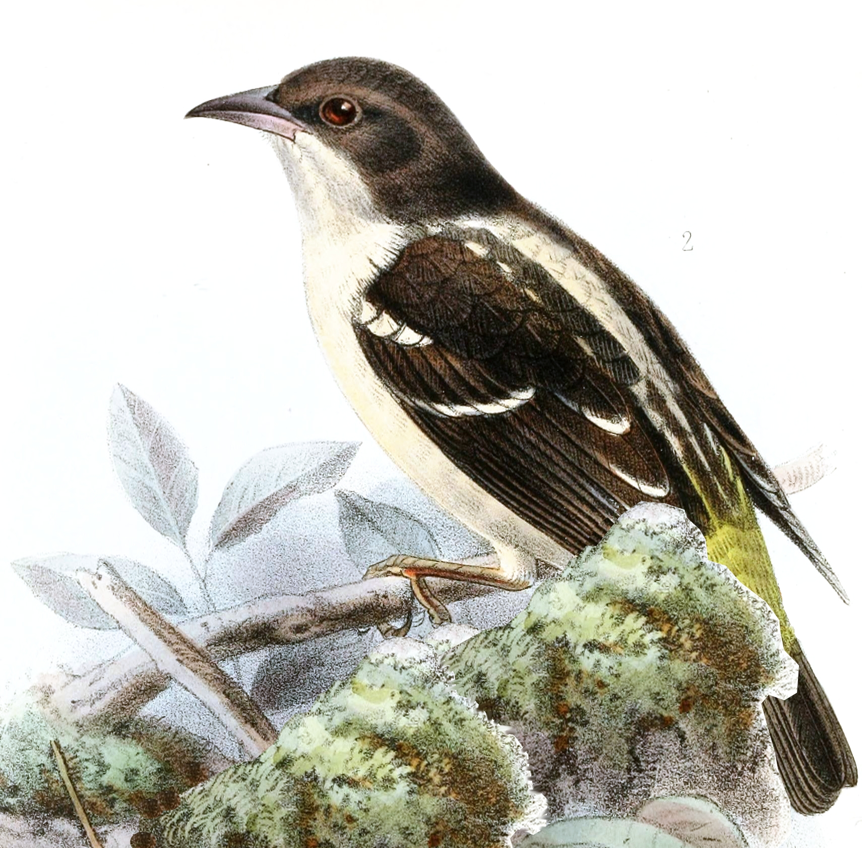 Ploceus angolensis